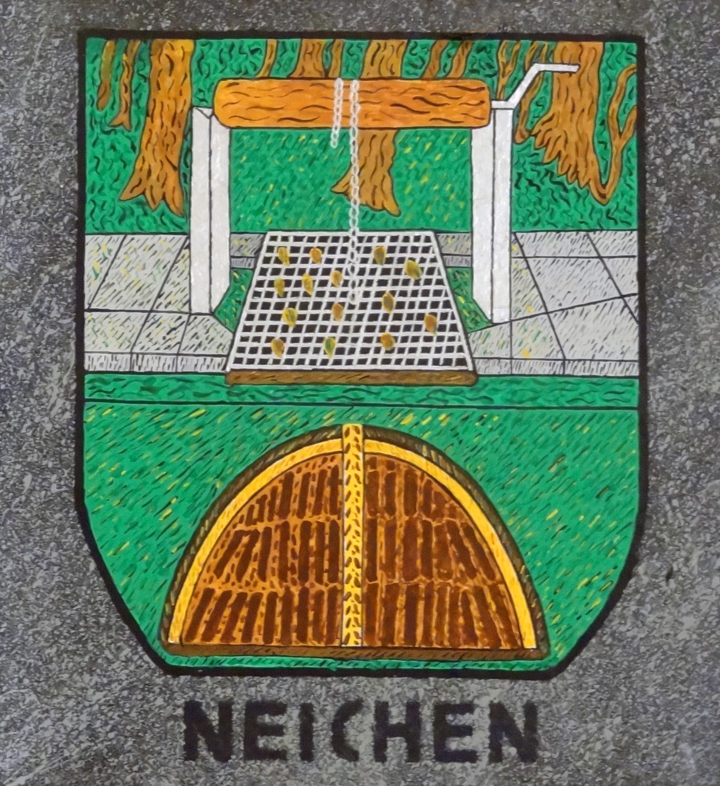 Schiefertafel als Ortswappen von Neichen, erstellt von Richard Lenzgen